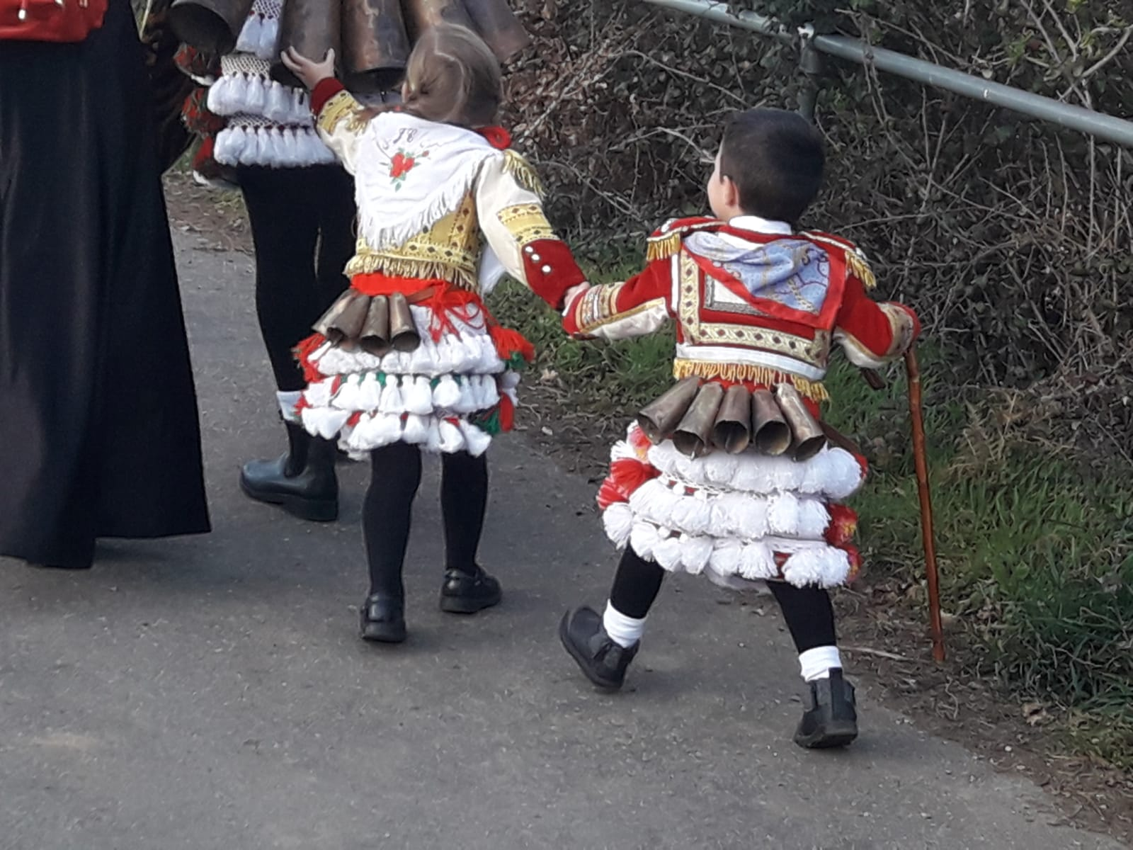 Nena e neno vestidos de Felo.